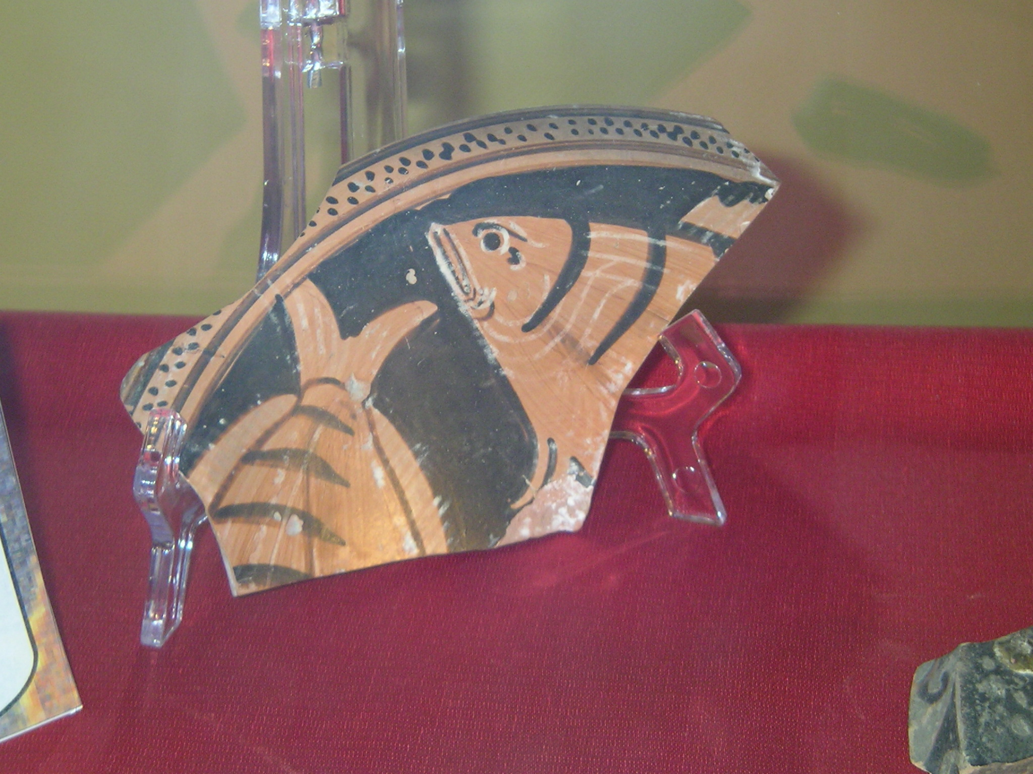 griechisches Keramikfragment, IV. Jahrhundert vor Chr., Corleone Museo Pippo Rizzo, Fundort Montagna Vecchia.